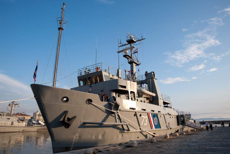 Dan HRM-a, Rijeka